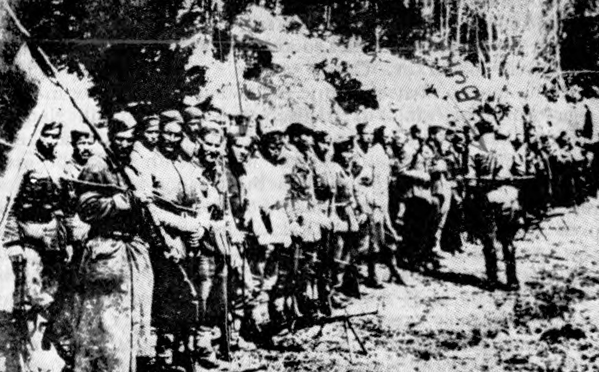 Ruska četa Gradnikove brigade.